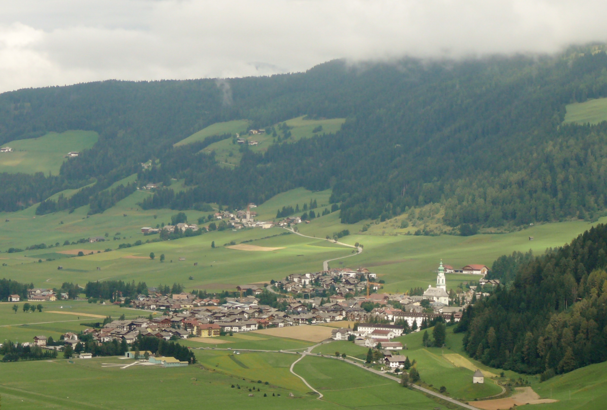 Panorama di dobbiaco da est